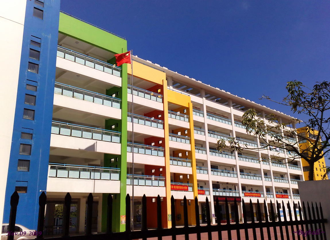 寰岛小学-By Bigball